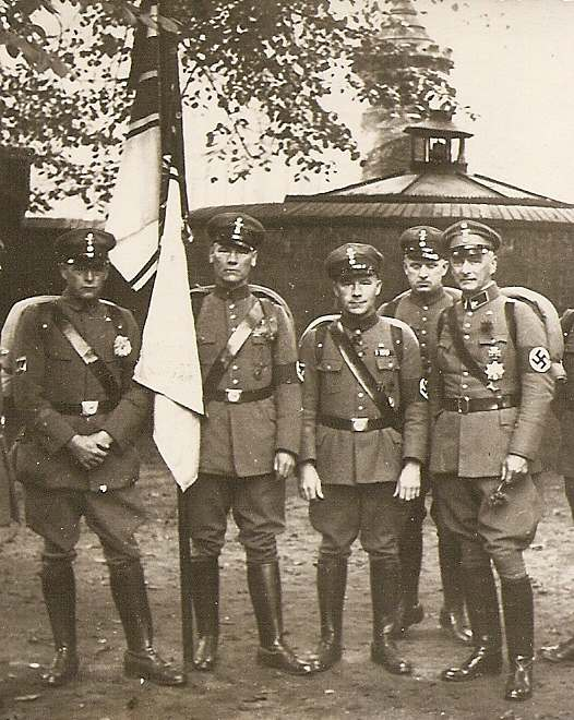 Aufmarsch des von den Nazis gleichgeschalteten „Stahlhelms, Bund der Frontsoldaten“. Bei den abgebildeten Personen handelt es sich um Veteranen des Ersten Weltkriegs. Ausschnitt aus einem von meiner Mutter erstellten Foto, um 1934. Ergänzende Beschreibung der Uniform von Et Mikkel: Uniform des „Wehrstahlhelm“. (Die abgebildeten Personen) tragen die Uniform der kaiserlichen Armee mit dem kleinen Marschgepäck (Tornister und Decke), die mit nationalsozialistischen Emblemen ergänzt wurden: Zwischen den Kokarden befindet sich der NS-Parteiadler und am linken Oberarm die Armbinde der NSDAP. Darüber wurde normalerweise das Provinz- oder Landesabzeichen der jeweiligen Einheit getragen. Auf dem rechten Oberarm wird dagegen das Abzeichen des Reichskriegerbundes getragen. Daneben wird hier auch die Reichskriegsflagge (1903–1918) geführt.